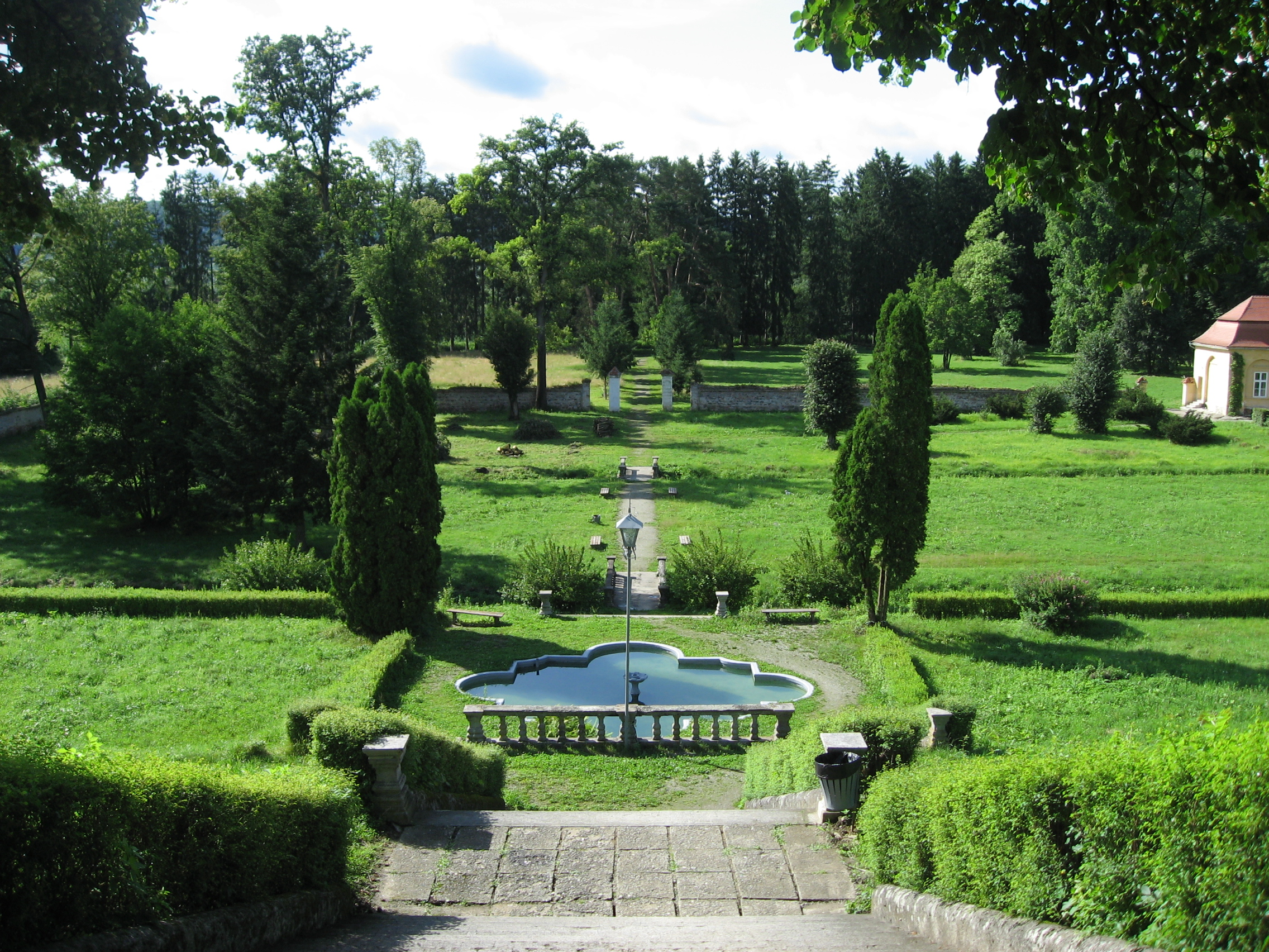 Brukenthal'sche Sommerresidenz in Freck / Avrig, Blick auf die Parkanlage vom Plateau des Hauptgebäudes aus gesehen 01